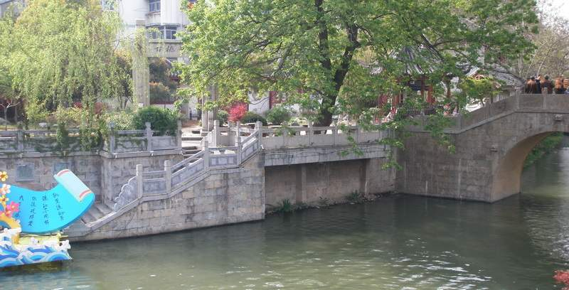 南京桃叶渡